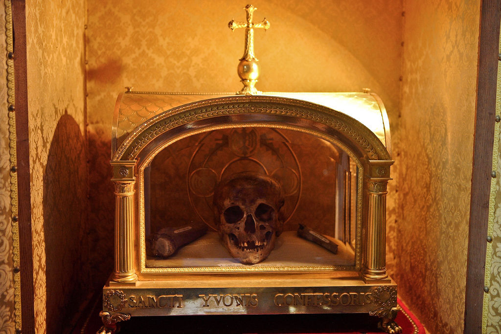 le chef de Saint Yves, tel qu'il se trouve dans le trésor de la Cathédrale de Tréguier